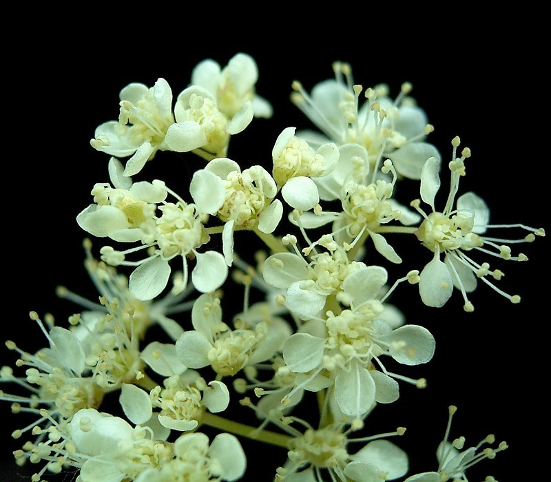 Filipendula ulmaria